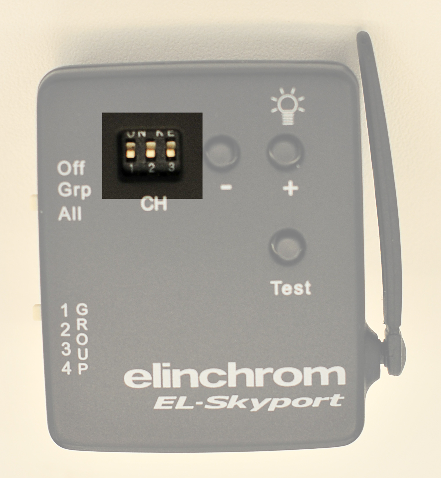 Diskussion zum Bildfilter in Hannover Bei Anfrage bitte ohne Rückfrage löschen, falls die abgebildete Person darum bittet.